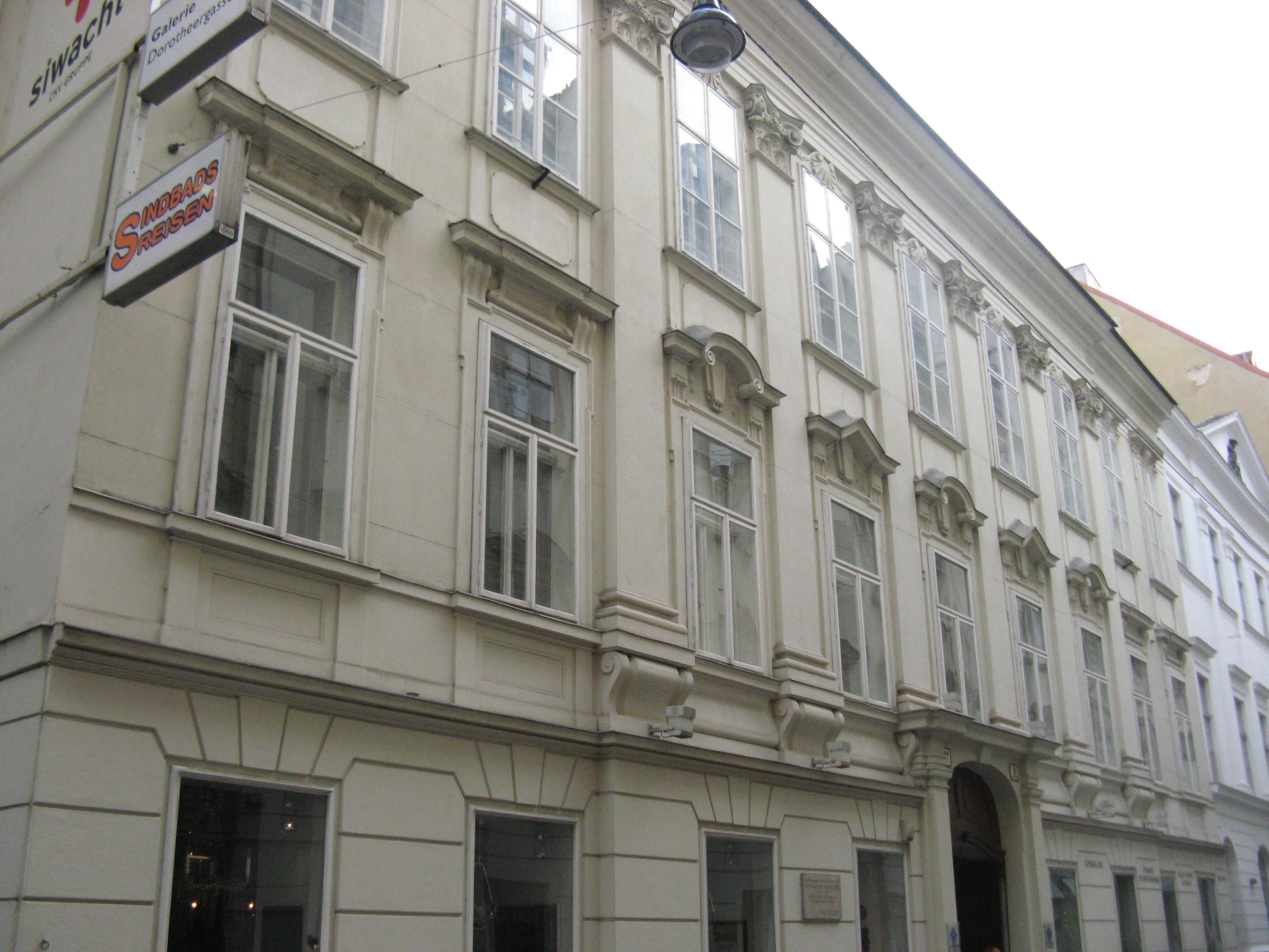 Palais Starhemberg (1702) von Matthias Steinl, Dortheergasse 9, Wien-Innere Stadt